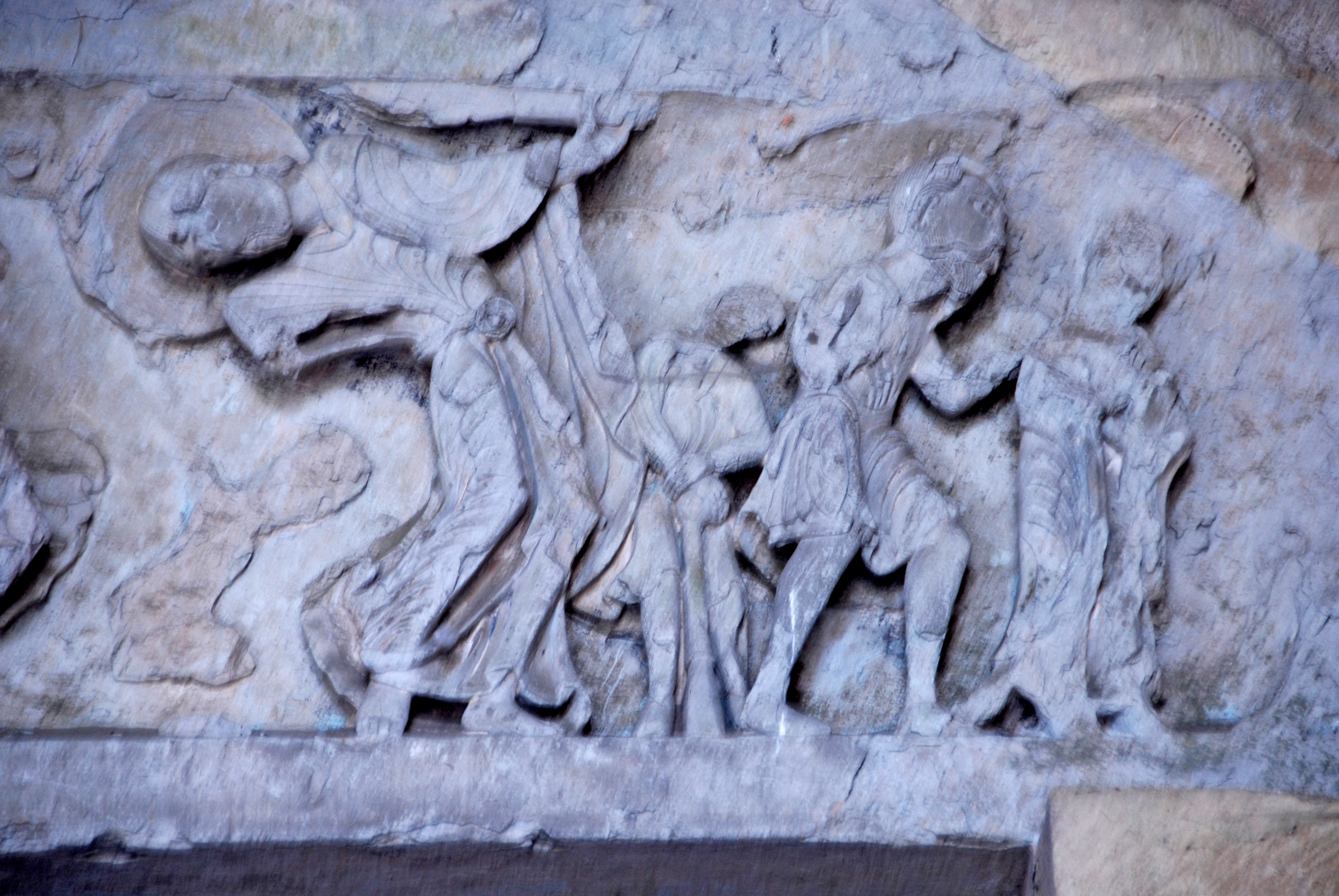 Portal, Türsturzrelief, rechts